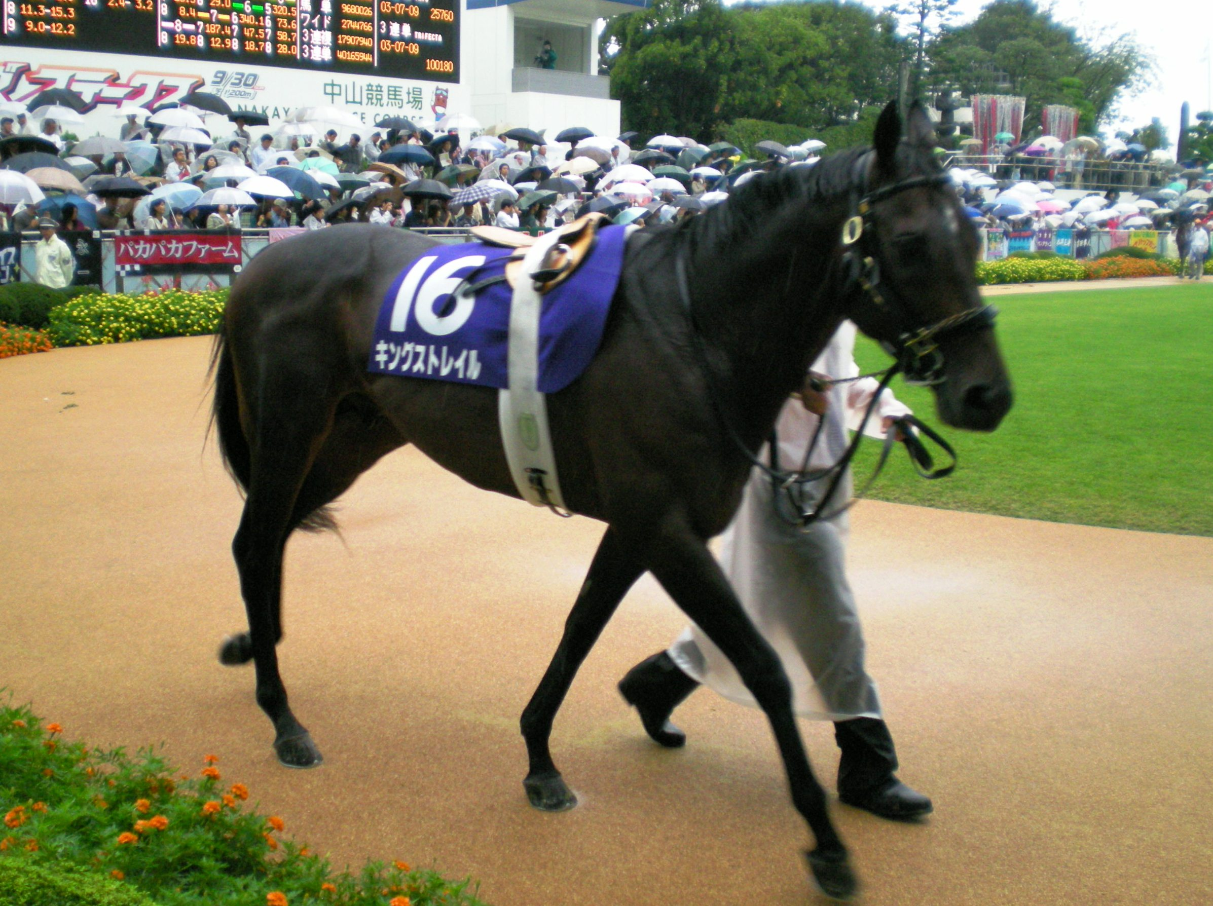 King's Trail